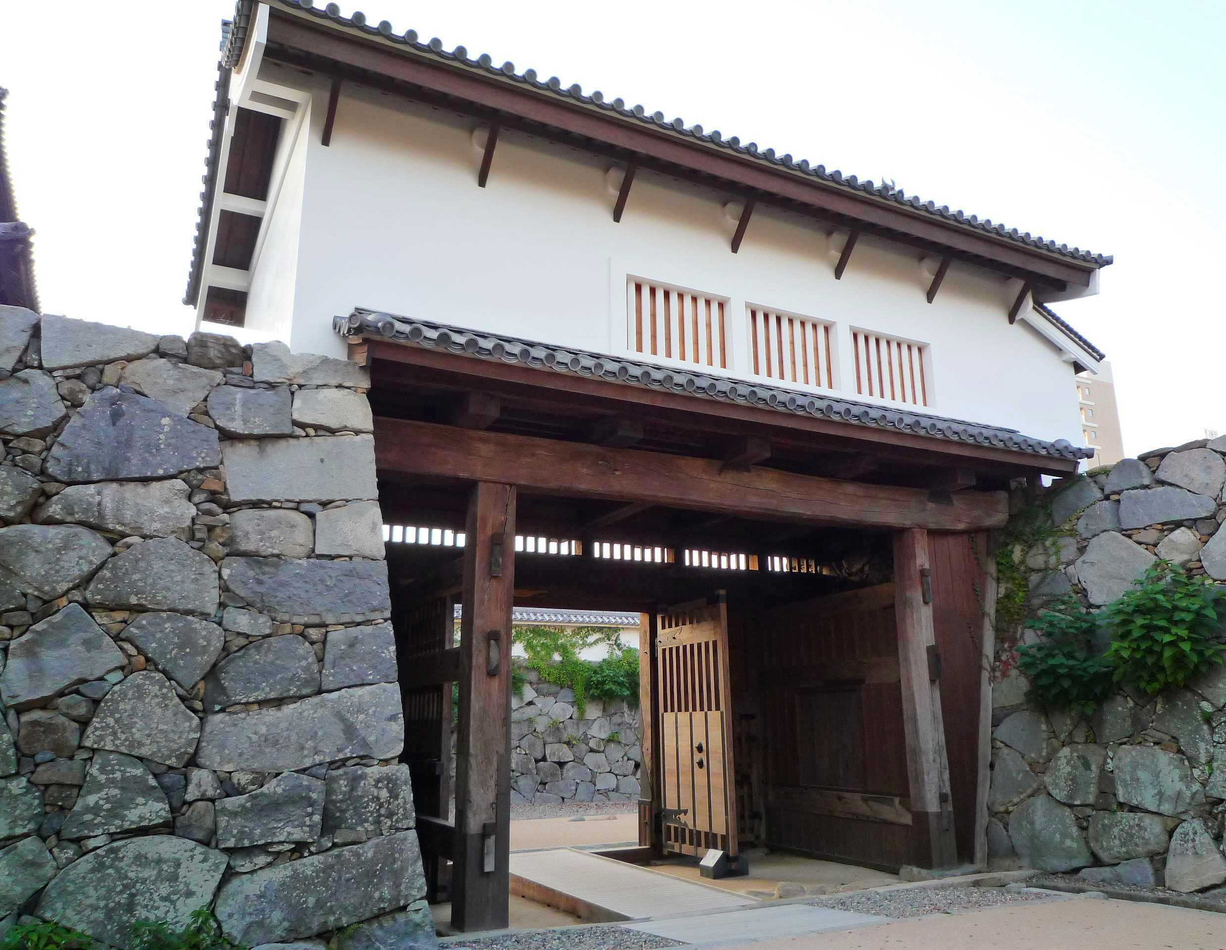 下之橋御門（2008年復元）